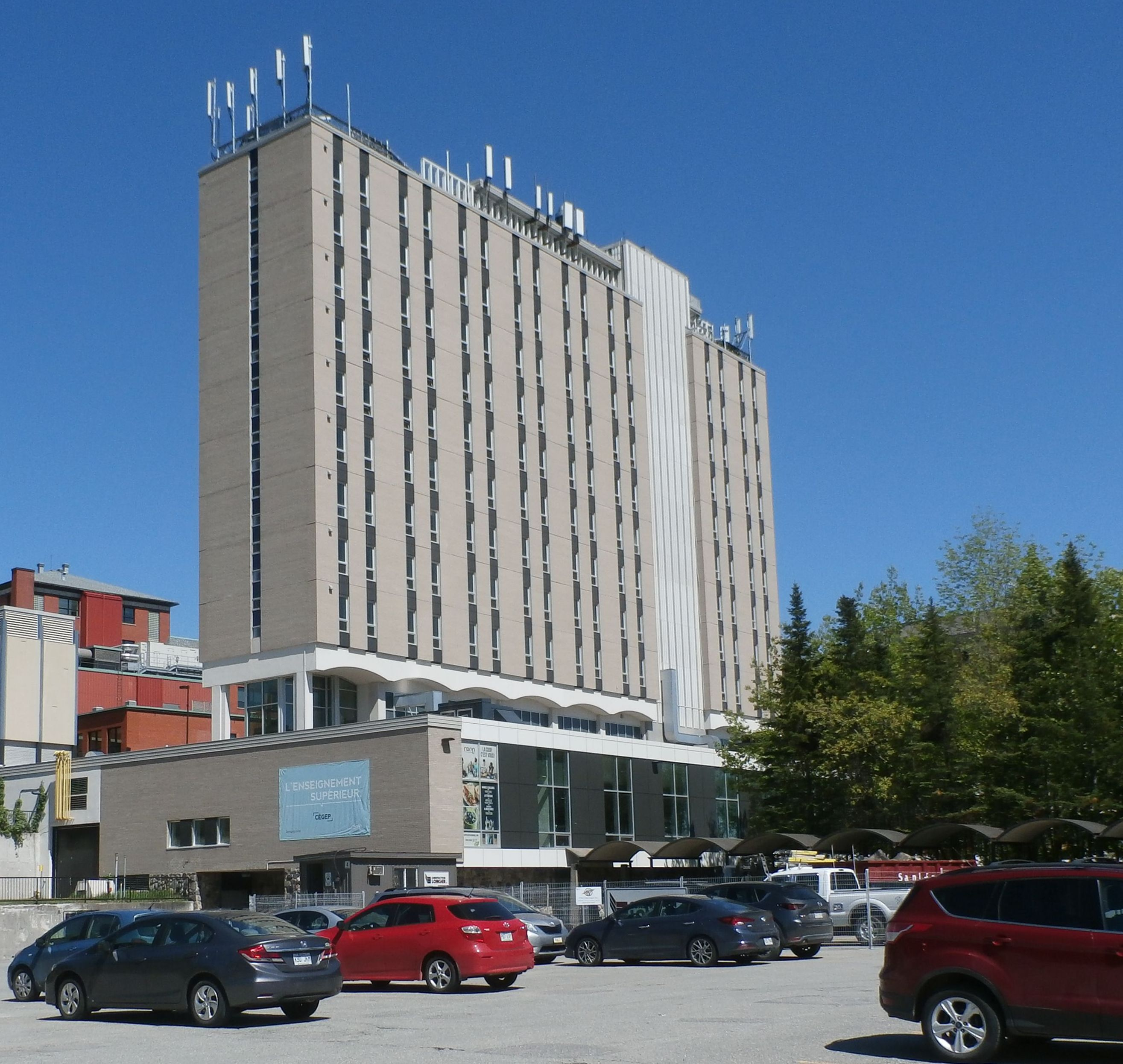 Batiment construit vers 1955 faisant partie de 3 batiments de l'école normale de Sherbrooke.